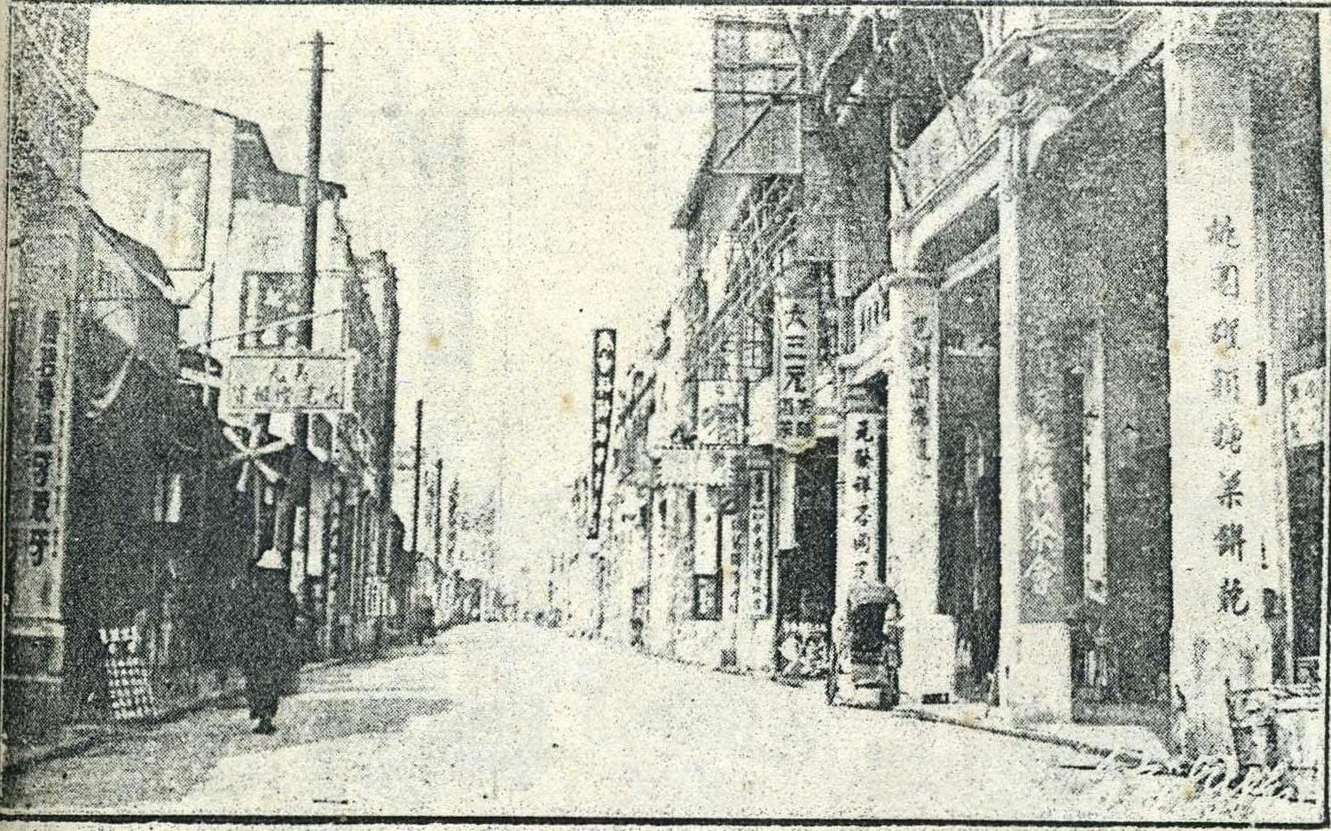 1933年广东新会的大新路